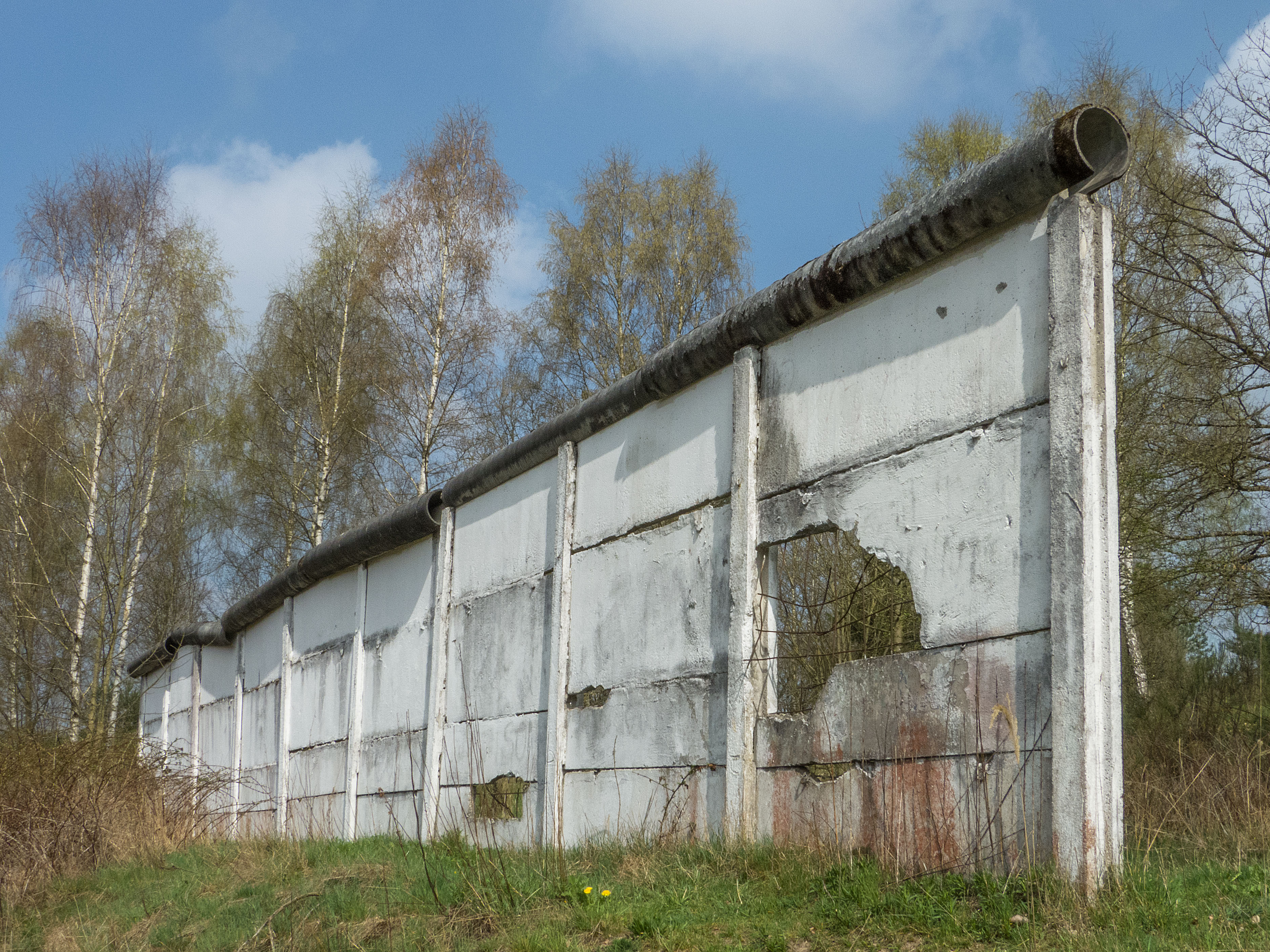 Als abschreckendes Mahnmal blieb ein kleiner Rest der ehemaligen Grenzmauer erhalten